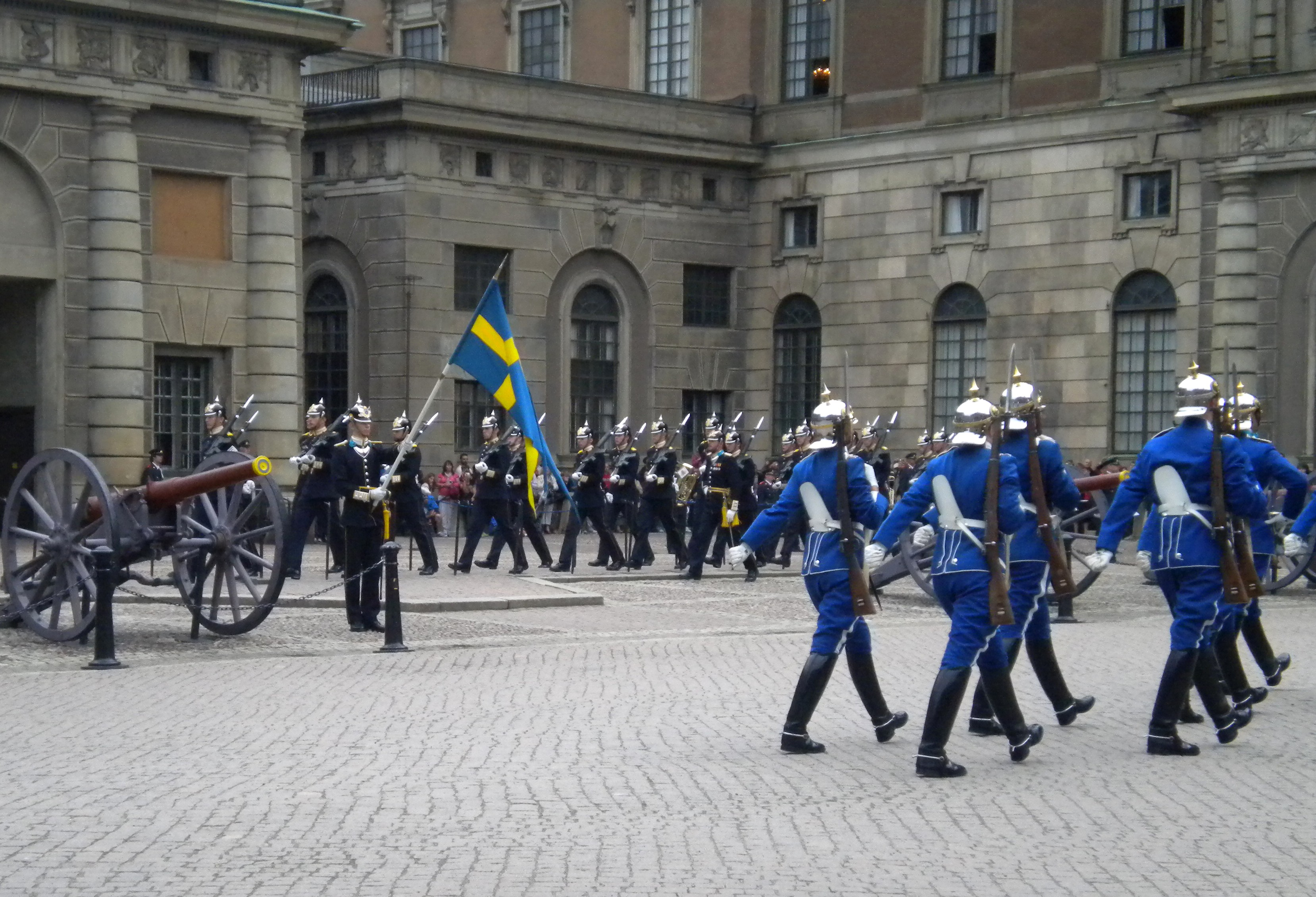 "Rundgång" under Högvaktsavlösningen 15/8-11.